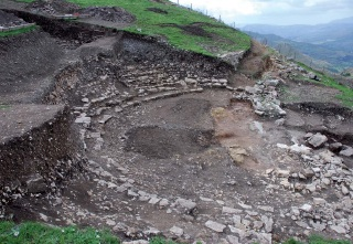 Teatro ellenistico di Hippana